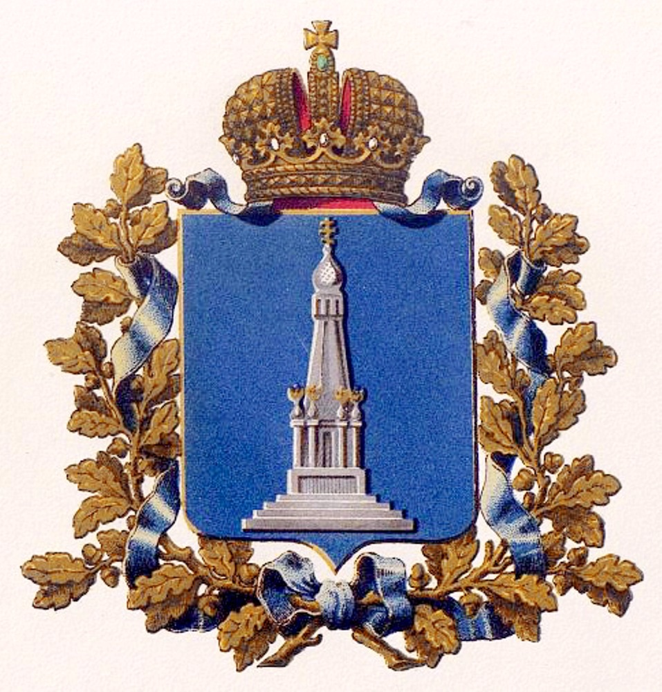 Official Russian Empire coat of arms Kovno Governorate. Герб Российской Империи Ковенской губернии в Гербовнике Бенке. Утверждён Императором Всероссийским Александром Вторым.